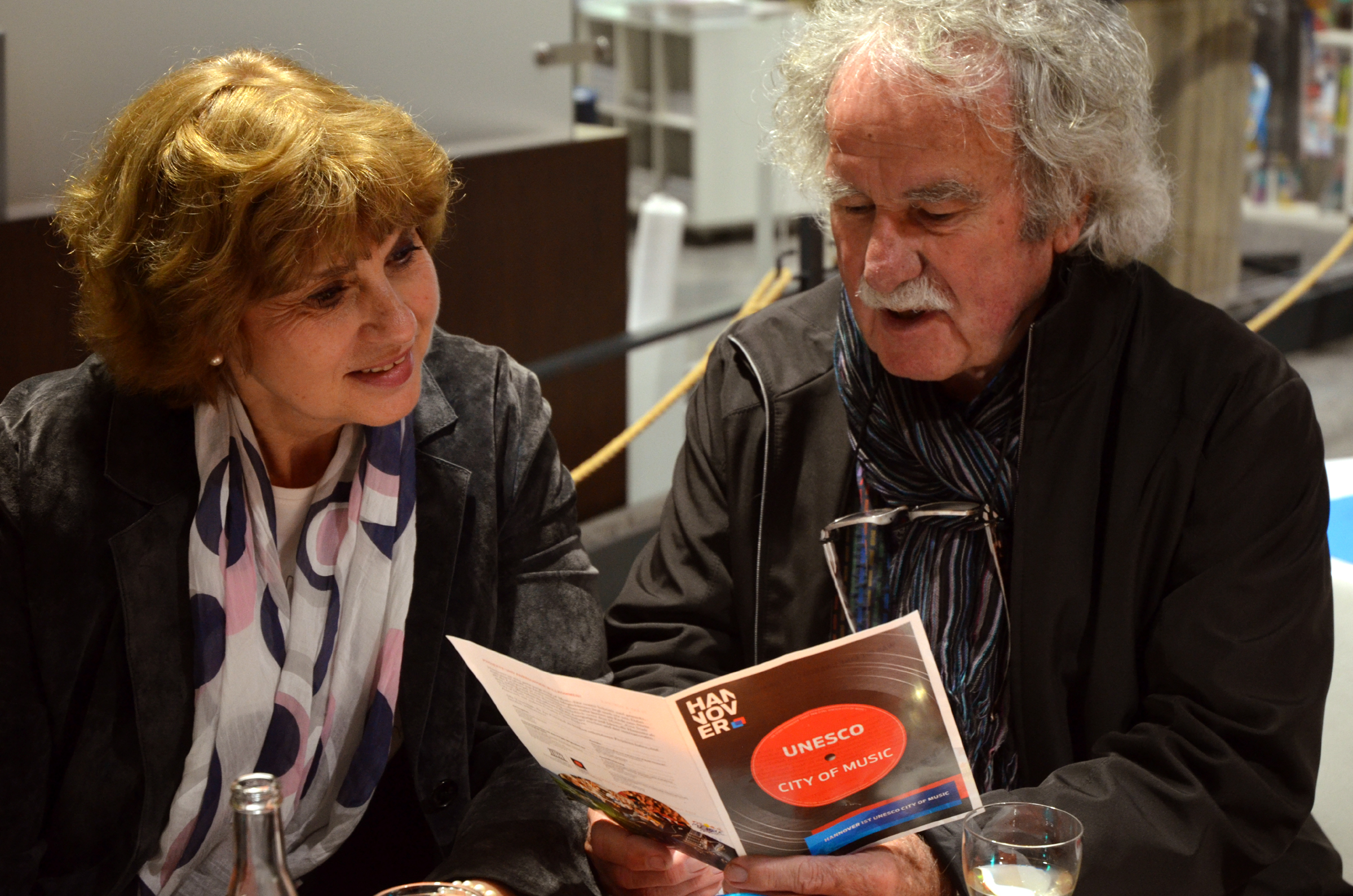 Das Paar Lily Knake und der Fotograf Joachim Giesel während der Vernissage der Ausstellung „Wege zum Smartphone“ am 26. September 2017 im Historischen Museum Hannover] ...